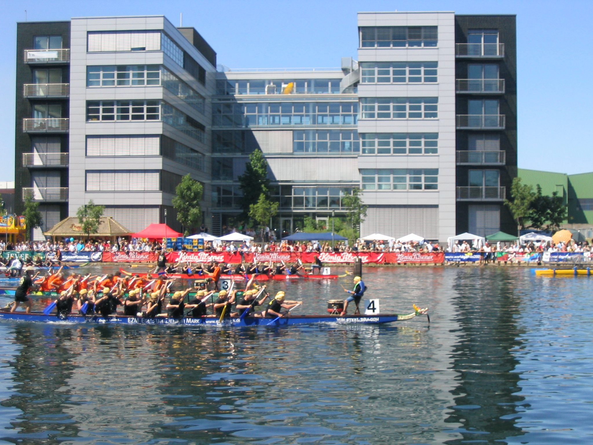 Drachenbootregatta beim Innenhafenfest de:2005 in Duisburg